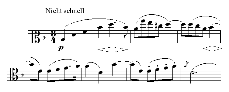 Les premières mesures de la partie d'alto de la première pièce des Märchenbilder pour alto & piano de Robert Schumann